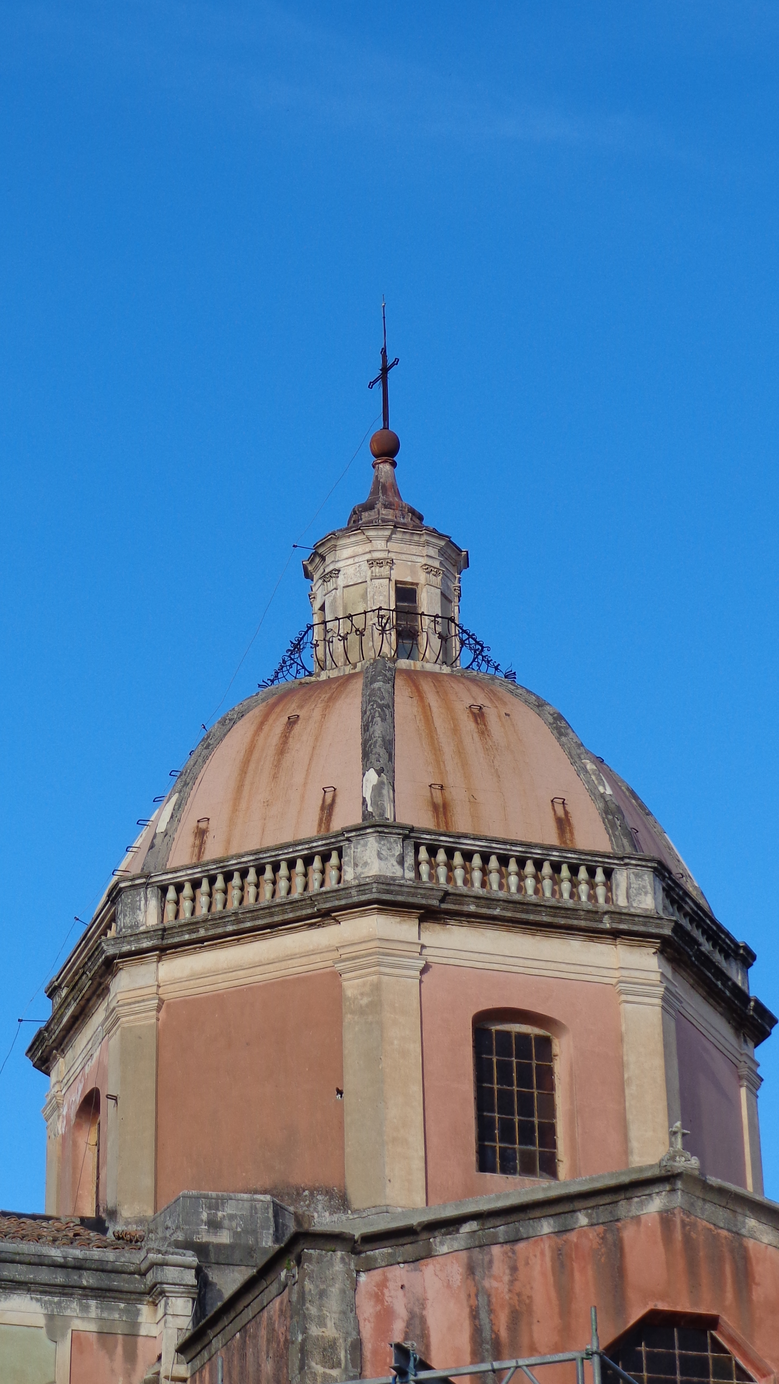 Cupola duomo